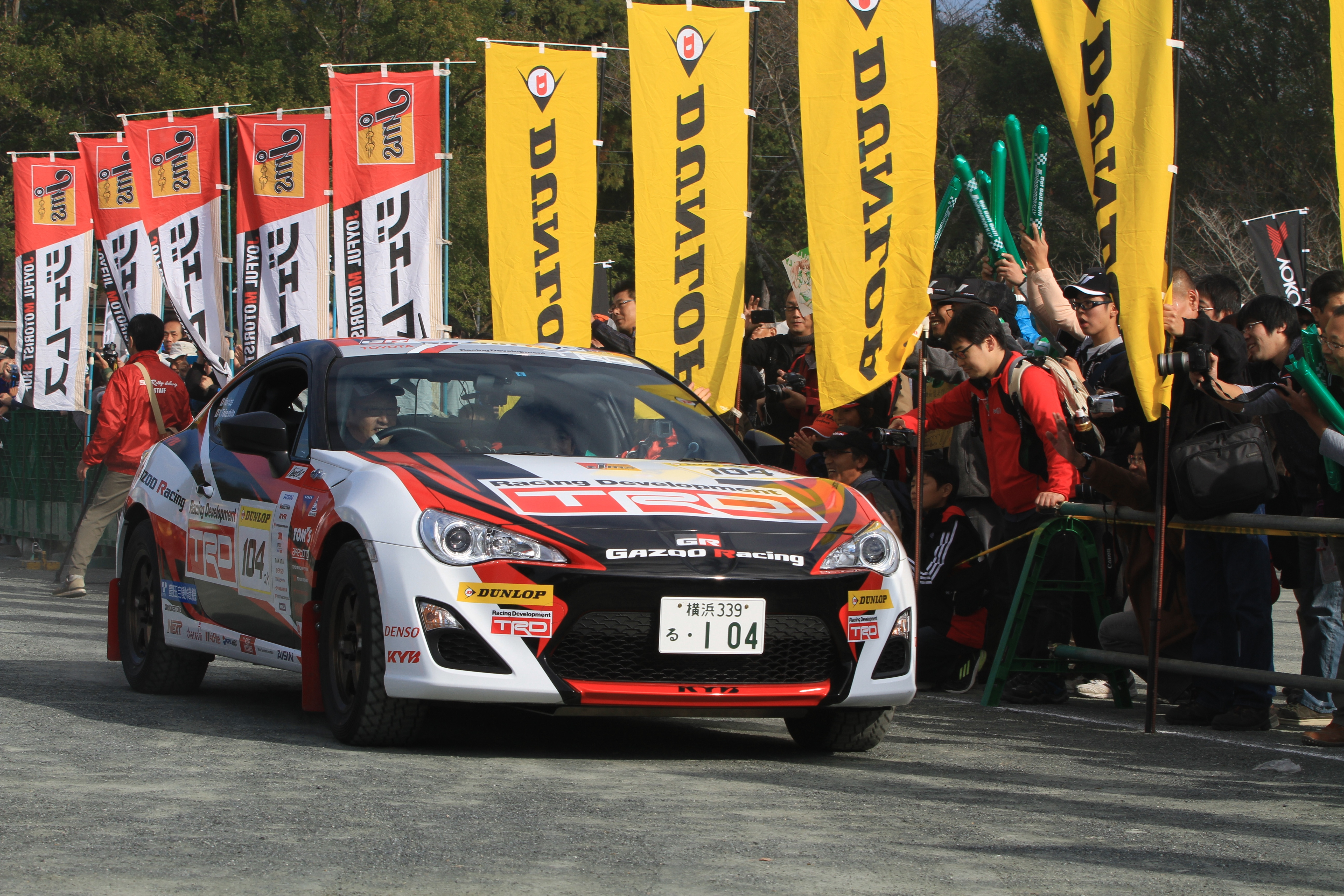 新城ラリー2012